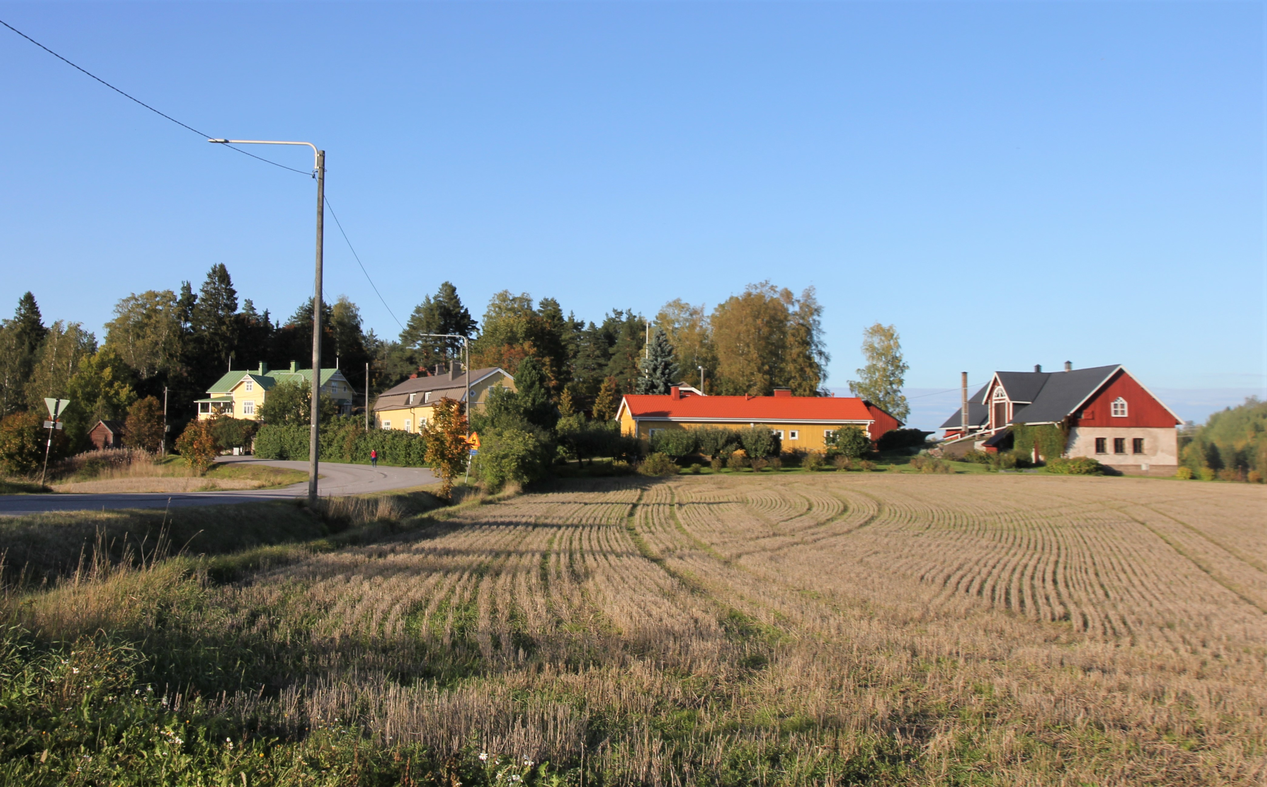 Kuninkaantietä Voutilan kylään tultaessa, Vantaan Ylästön kaupunginosassa. Kuvassa näkyvät talot ovat ruskeakattoinen Nedre Thors oikealla olevine piharakennuksineen (Kuninkaantie 1b: punakattoinen asuinrakennus, oikealla navetta) ja vasemmalla vihreäkattoinen Övre-Thors (Kuninkaantie 3). Koordinaatit Kuninkaantielle Nedre Thorsin pihatien kohdalle.